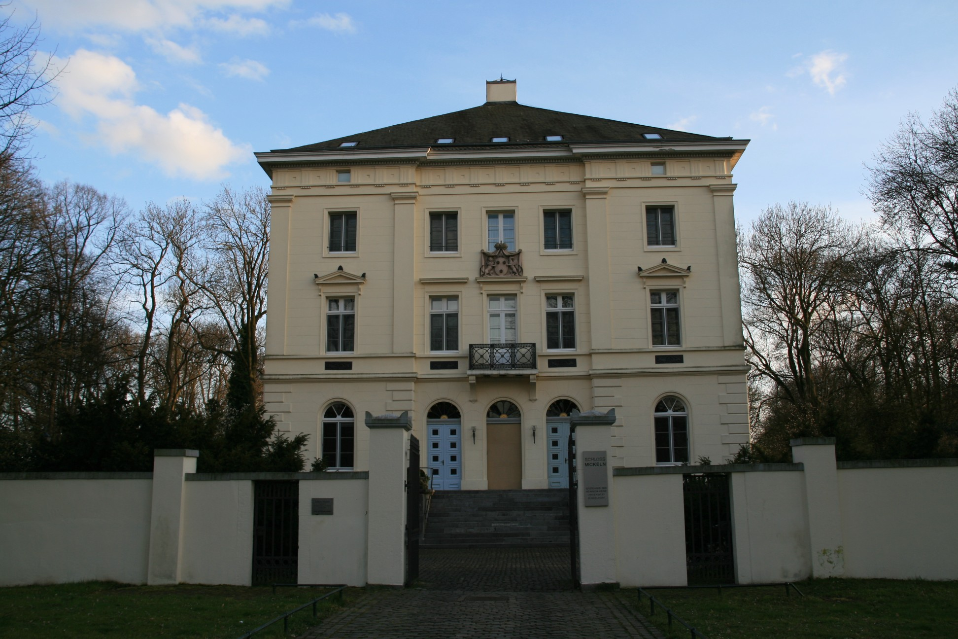 Schloss Mickeln in Düsseldorf-Himmelgeist